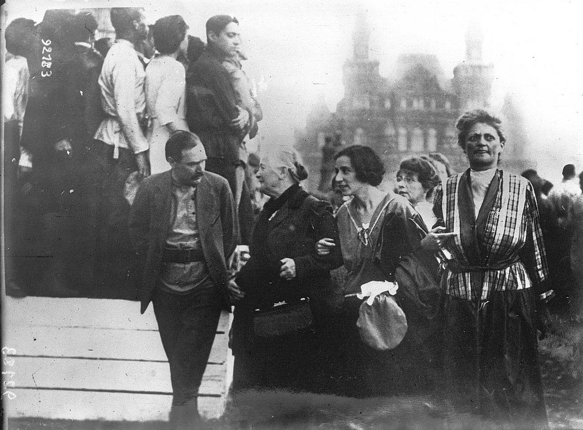 Клара Цеткин на 3-м конгрессе Коминтерна. Москва, 1921